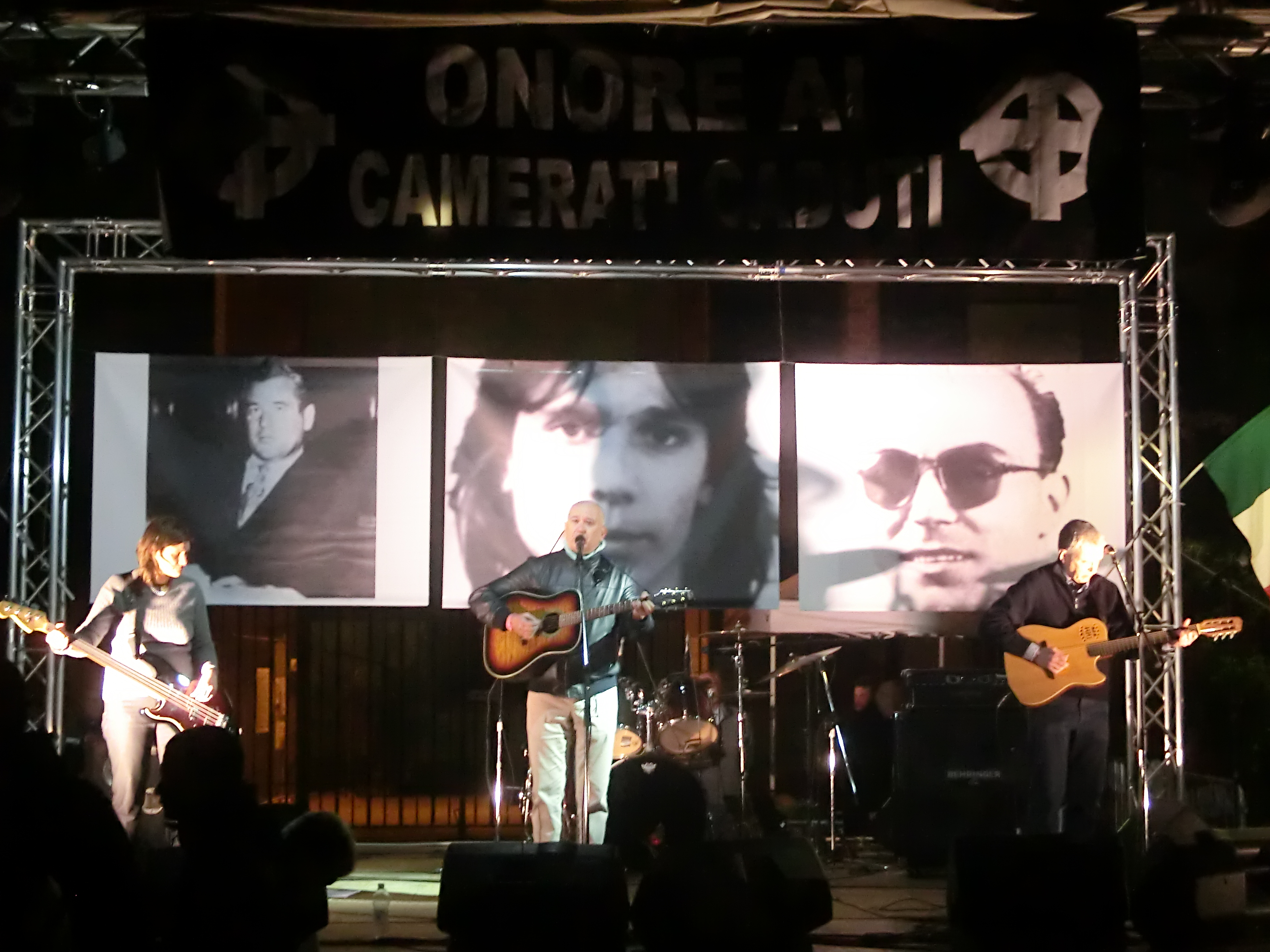 Gli Amici del vento in occasione del concerto del quarantennale per Ramelli